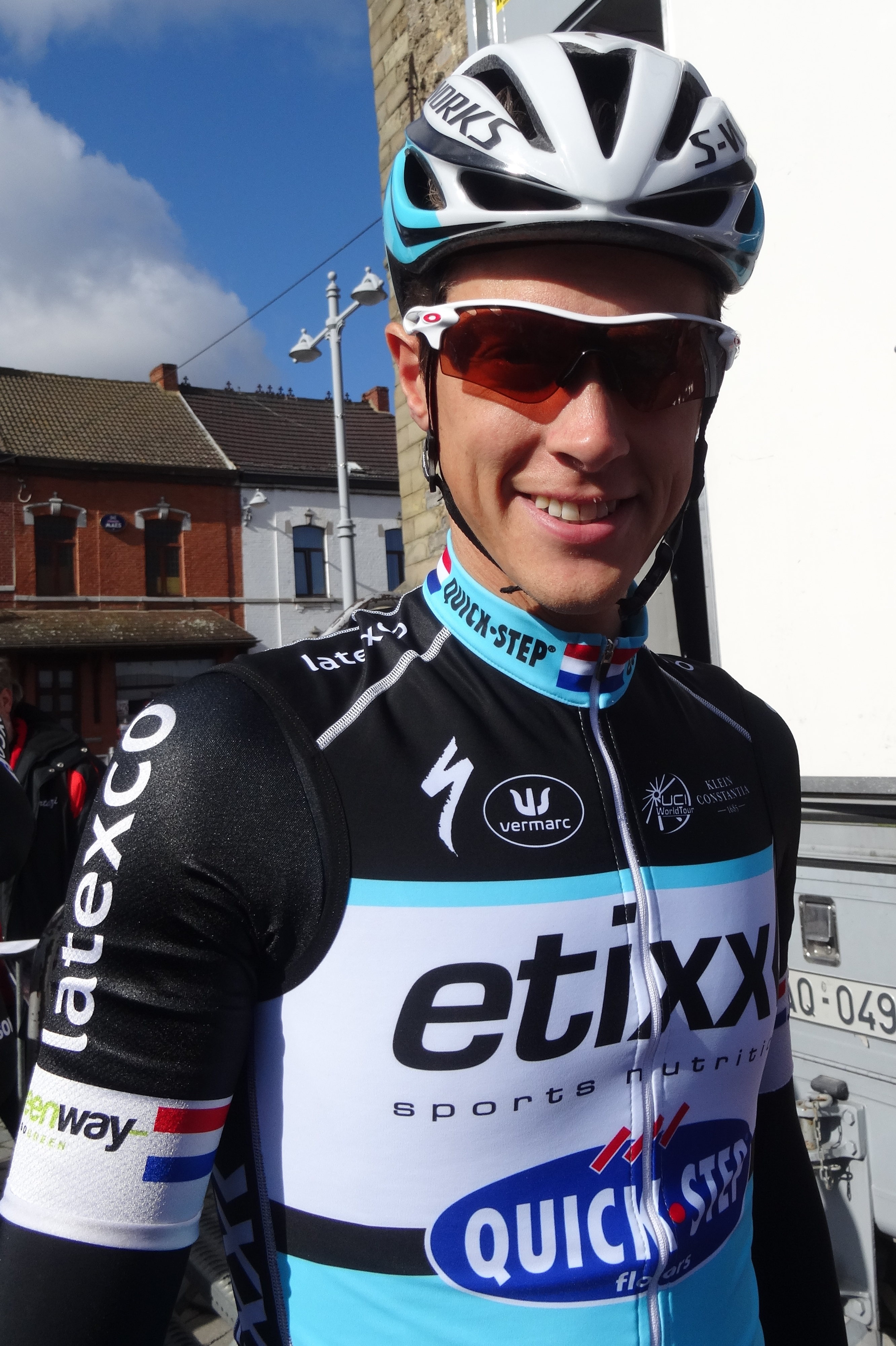 Reportage réalisé le mercredi 4 mars à l'occasion du départ du Samyn des Dames 2015 et du Samyn 2015 à Quaregnon, Belgique.